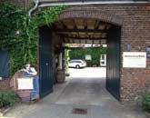 Valderhof